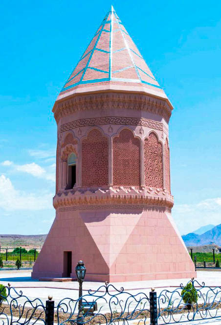 Gülüstan türbəsi bərpadan sonra